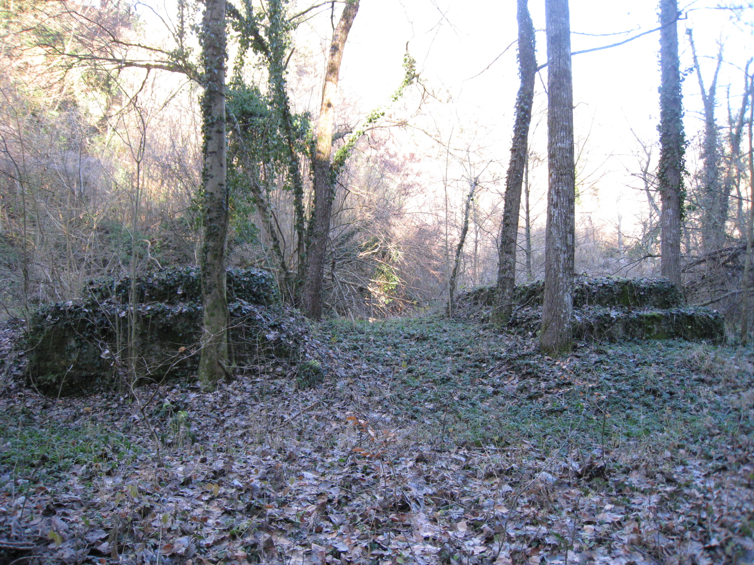 piles verdures